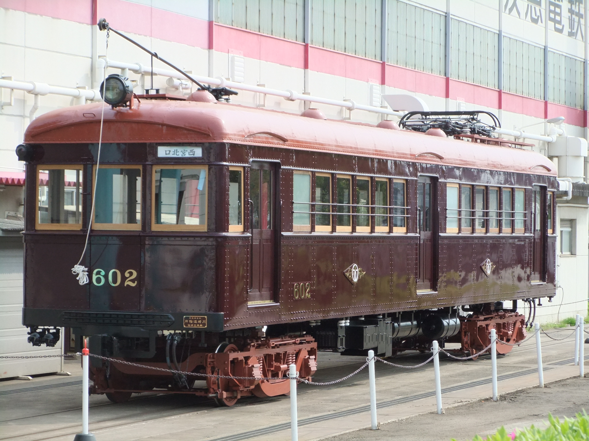 阪急602号新製時復元後。